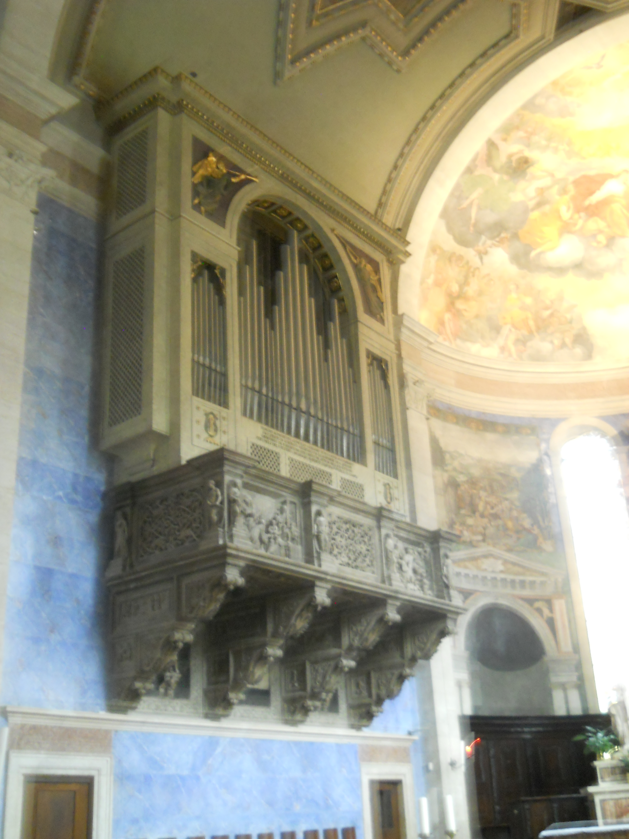 Organo della Chiesa di Santa Maria a Trento (Italia)